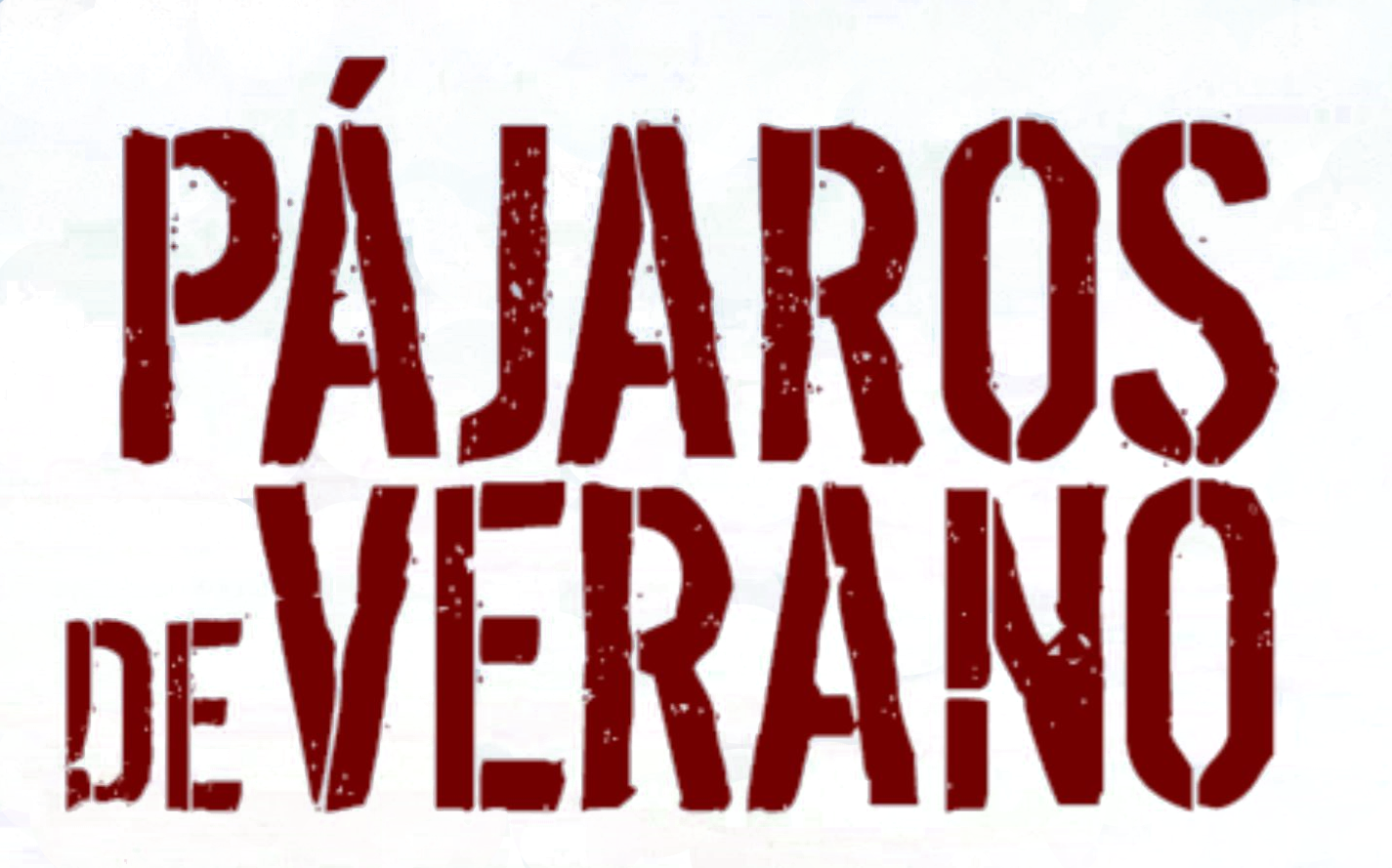 Logo de la película Pájaros de Verano